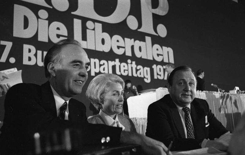 27. Bundesparteitag der F.D.P in Frankfurt am Main